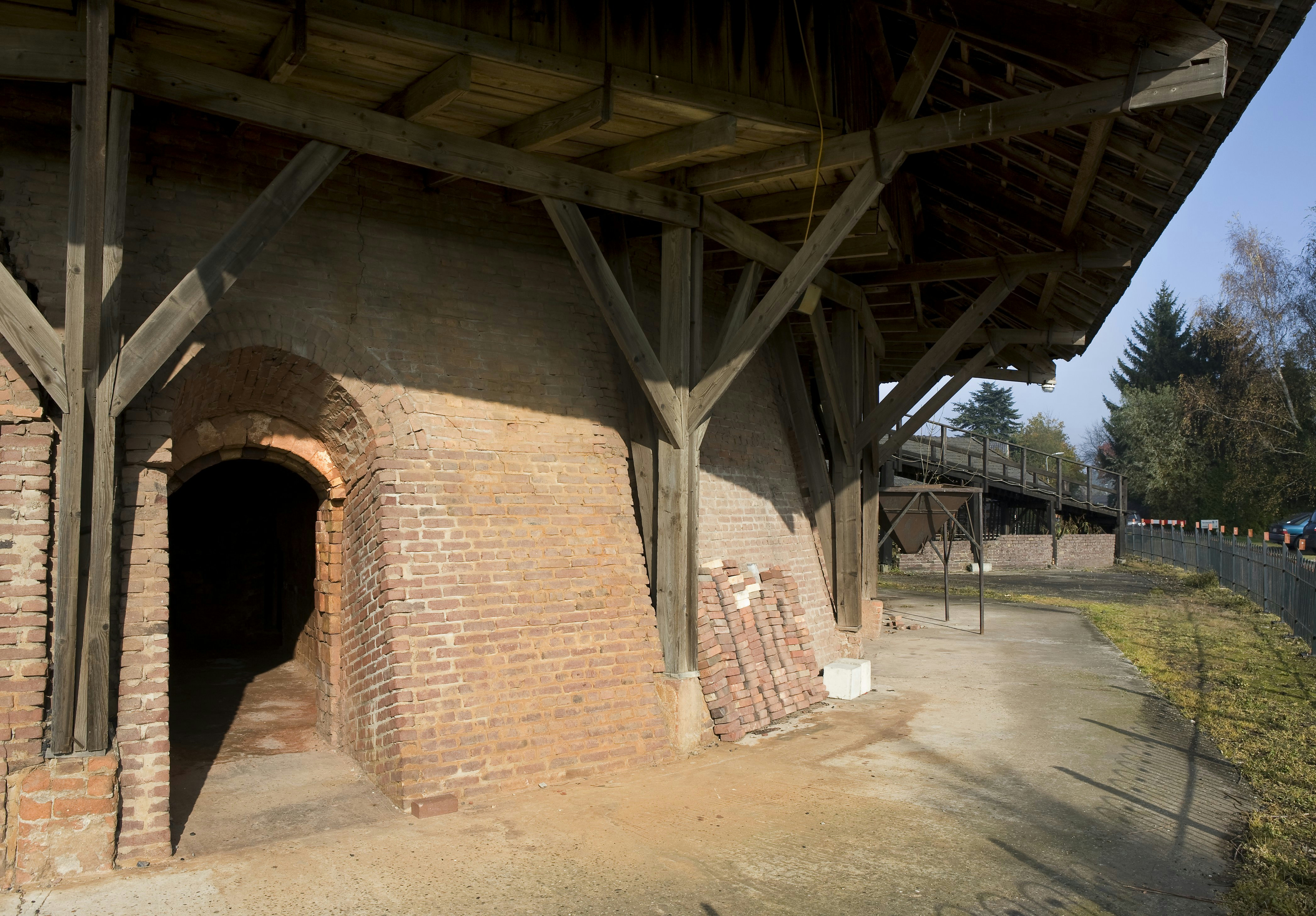 Voormalige pannenfabriek, thans Baksteenmuseum De Panoven: Detail van de ingang naar stookkamer (opmerking: Gefotografeerd voor portfolie nieuwbouw)